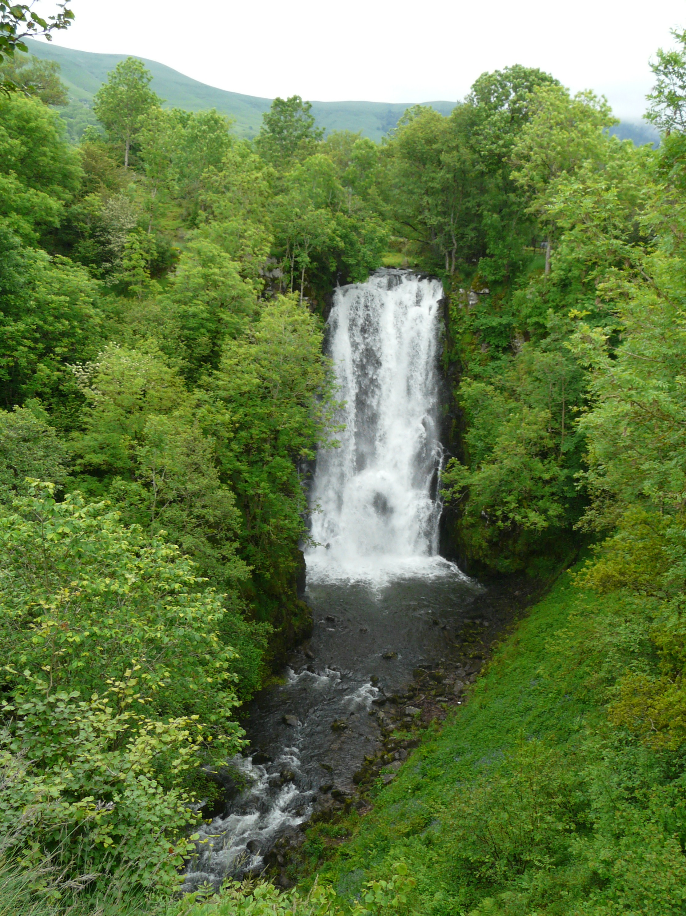 La cascade du Sartre sur la Petite Rhue, Cheylade, Cantal, France.